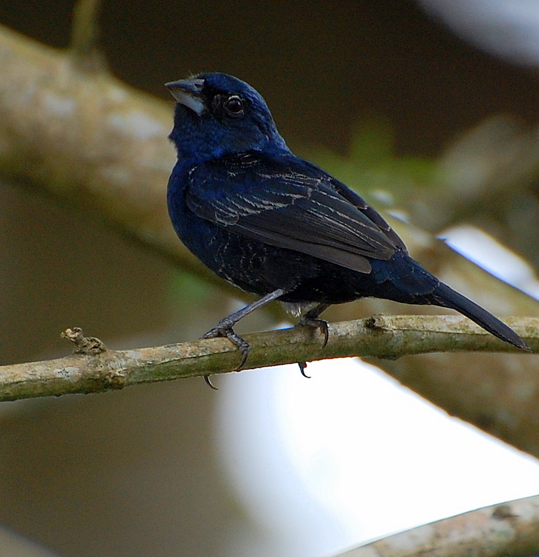 No quintal da casa da minha sogra na cidade de Registrto-SP